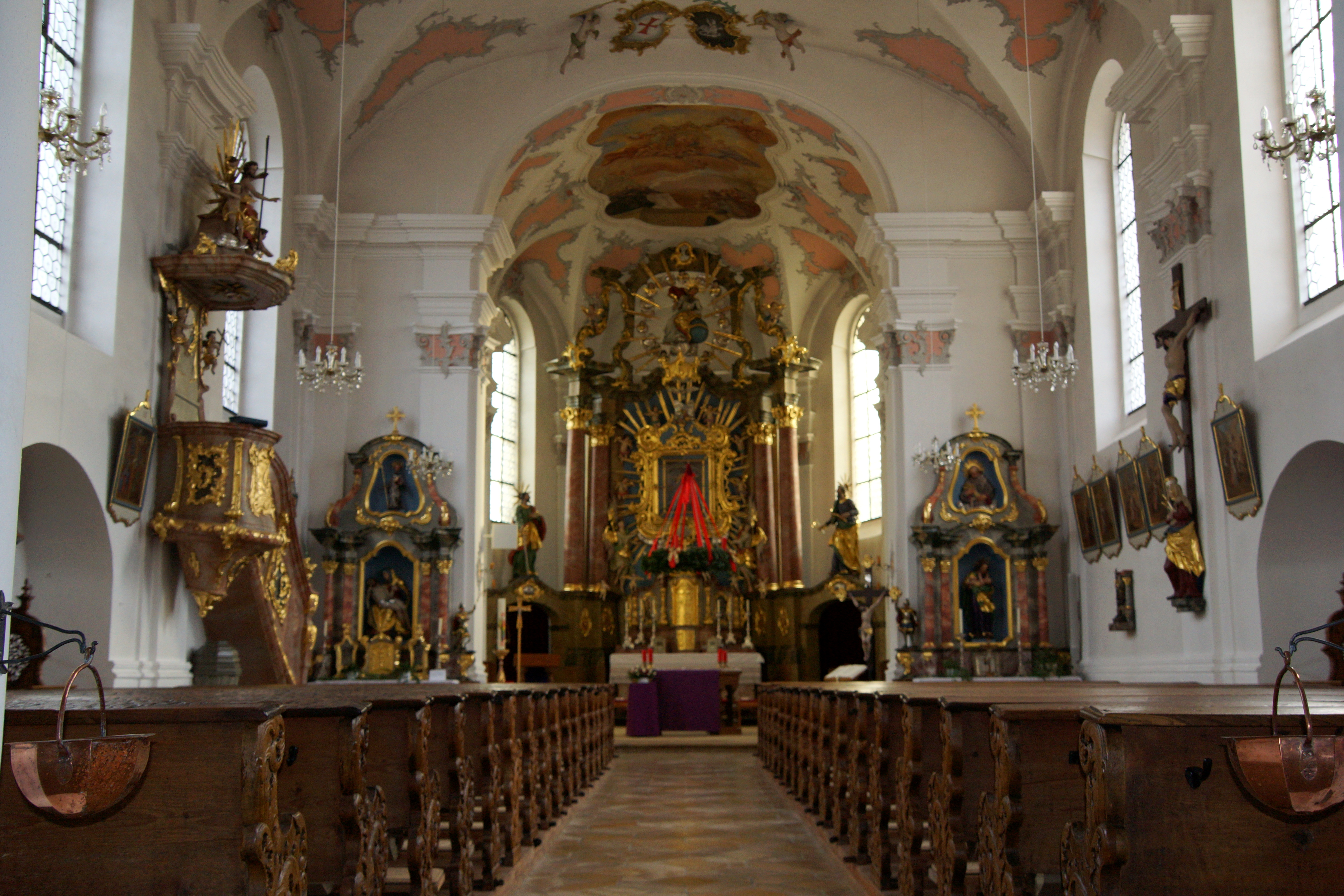 Die katholische Pfarrkirche Mariä Heimsuchung in Hohenschambach bei Hemau